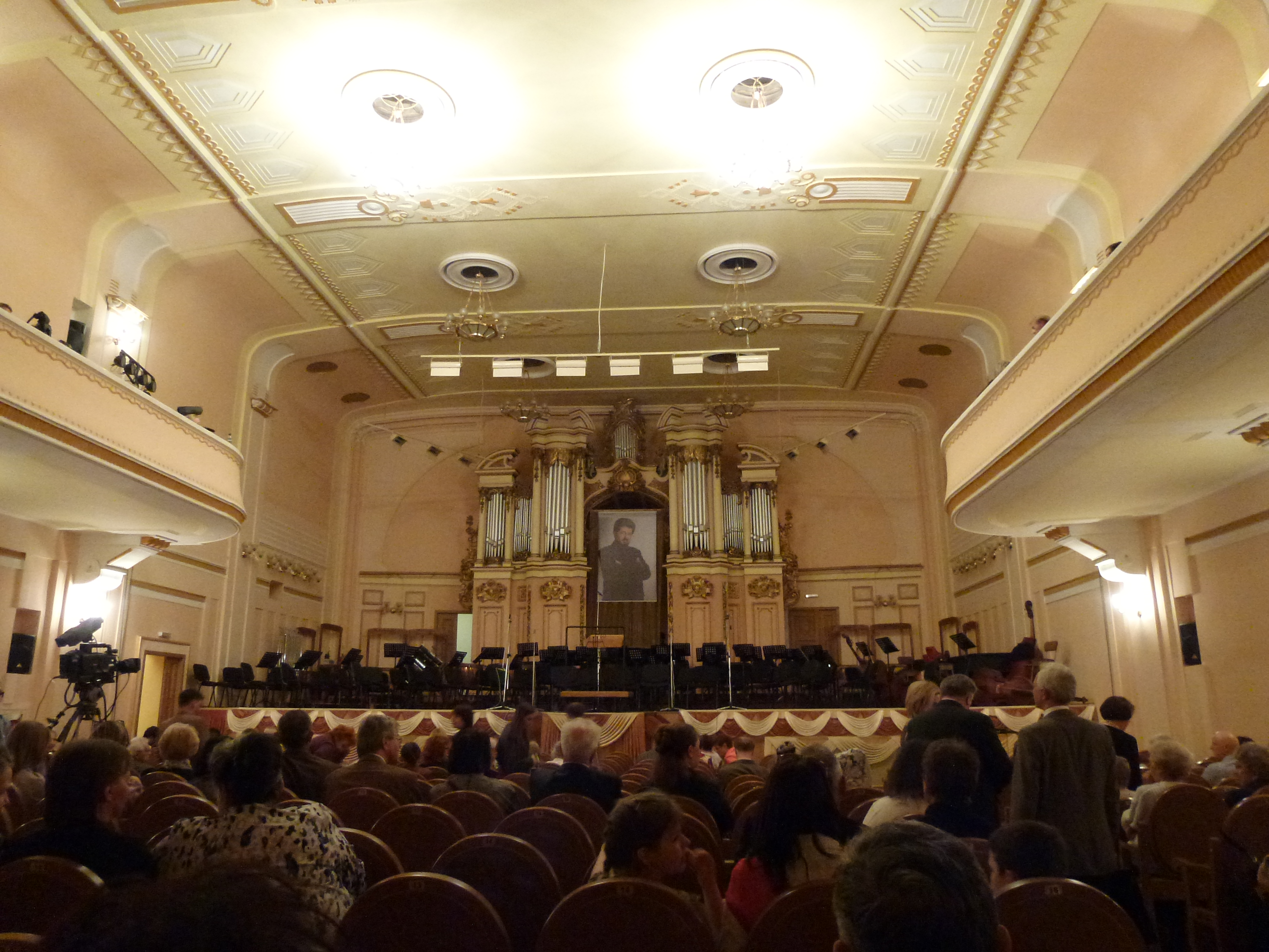 Sala koncertowa filharmonii lwowskiej